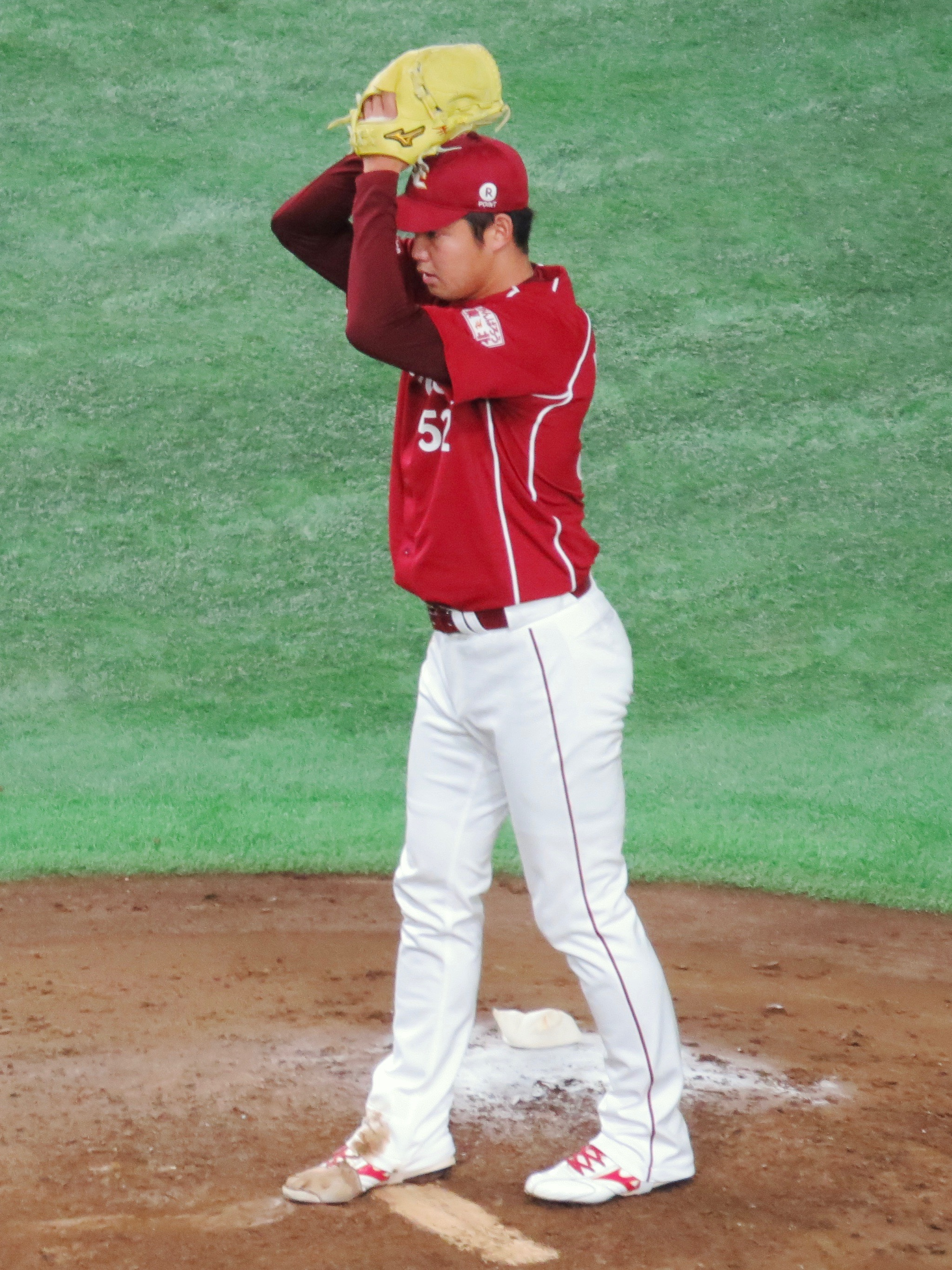 東京ドームにて